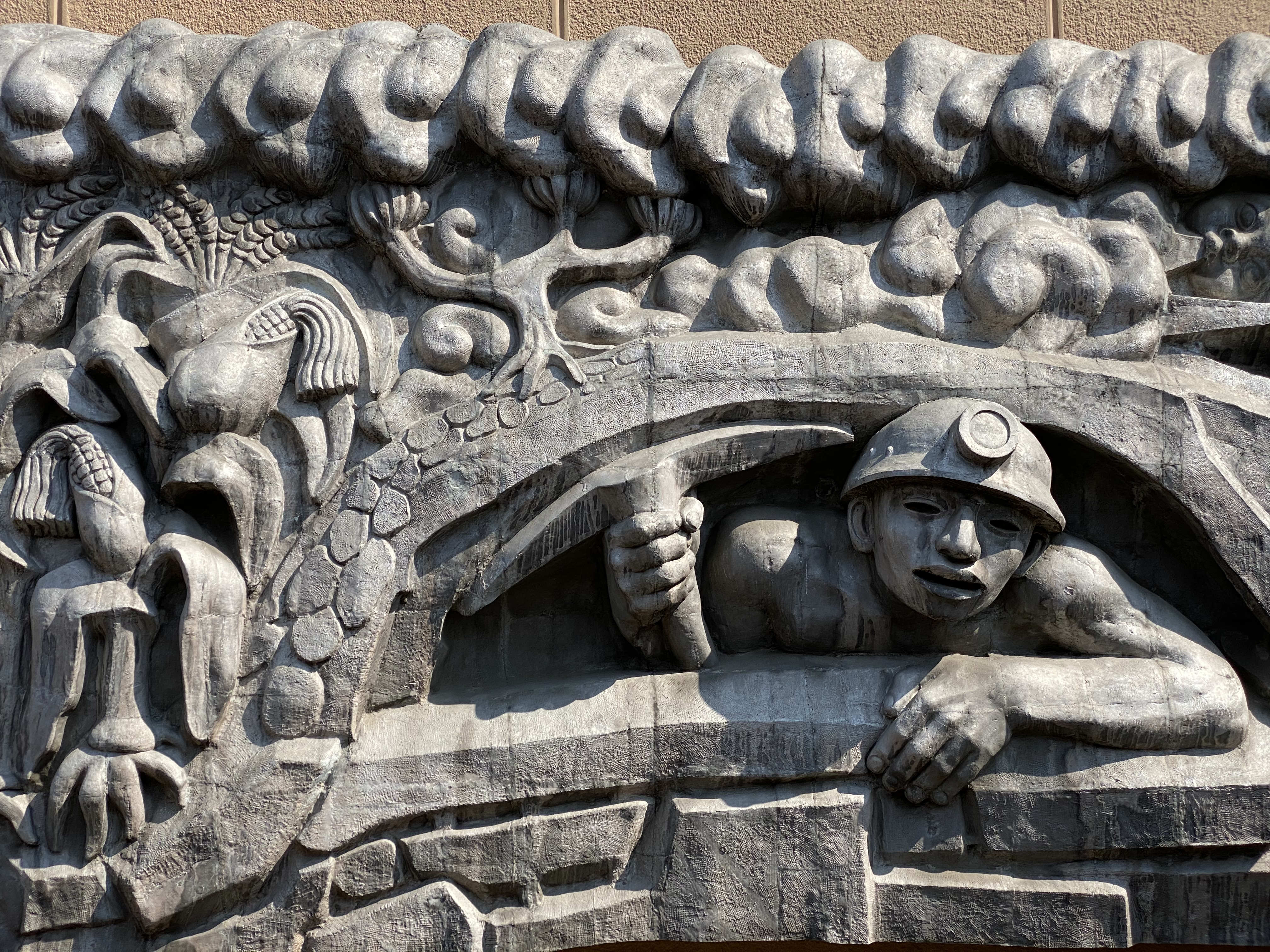 Técnica en aluminio fundido, estacionamiento del Centro Médico Nacional Siglo XXI, 1958